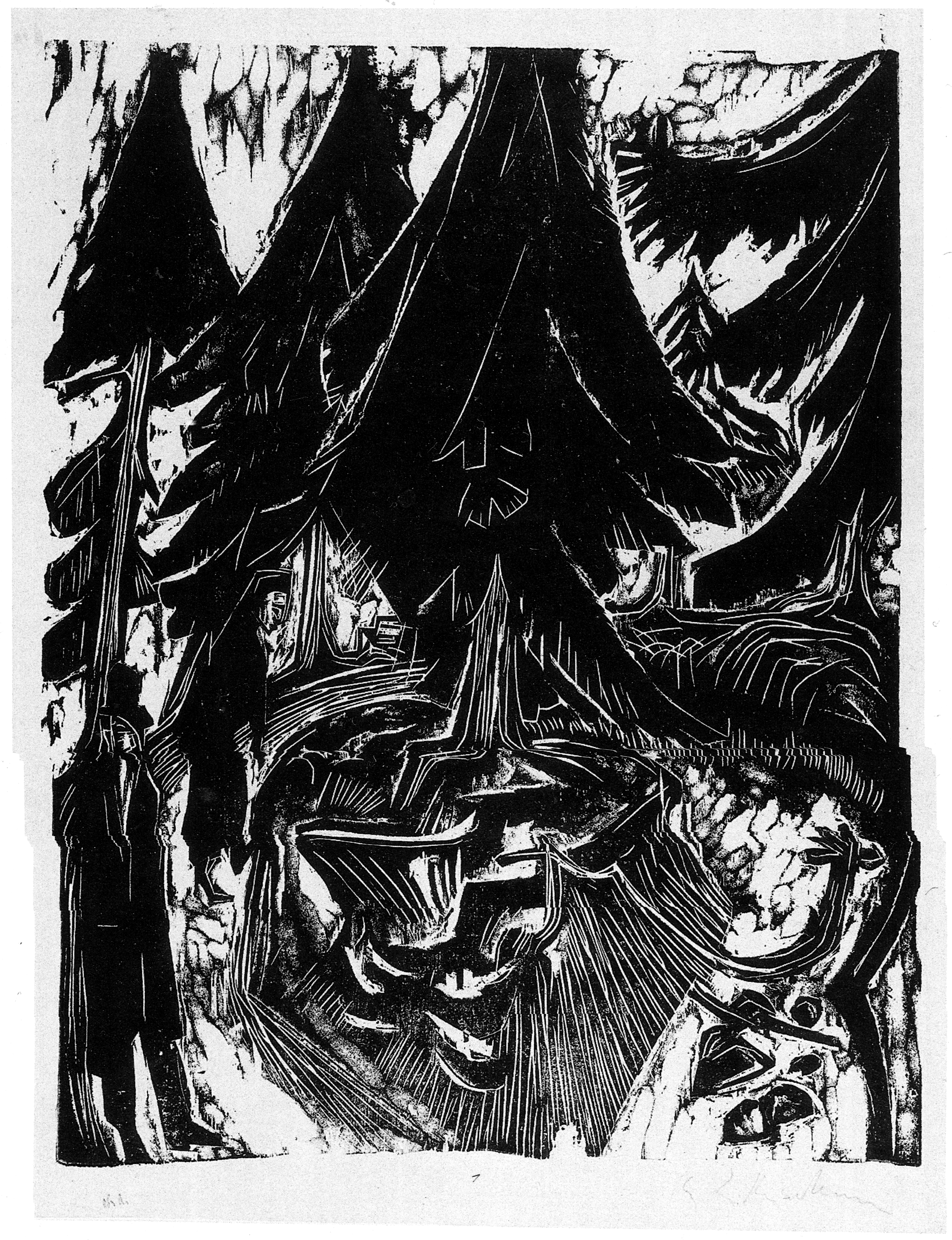 Titel: Sanatoriumsspaziergang 1916, Holzschnitt 46,2 x 35,5 von Ernst Ludwig Kirchner